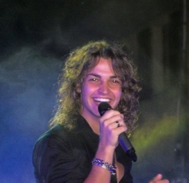 Foto scattata in un concerto